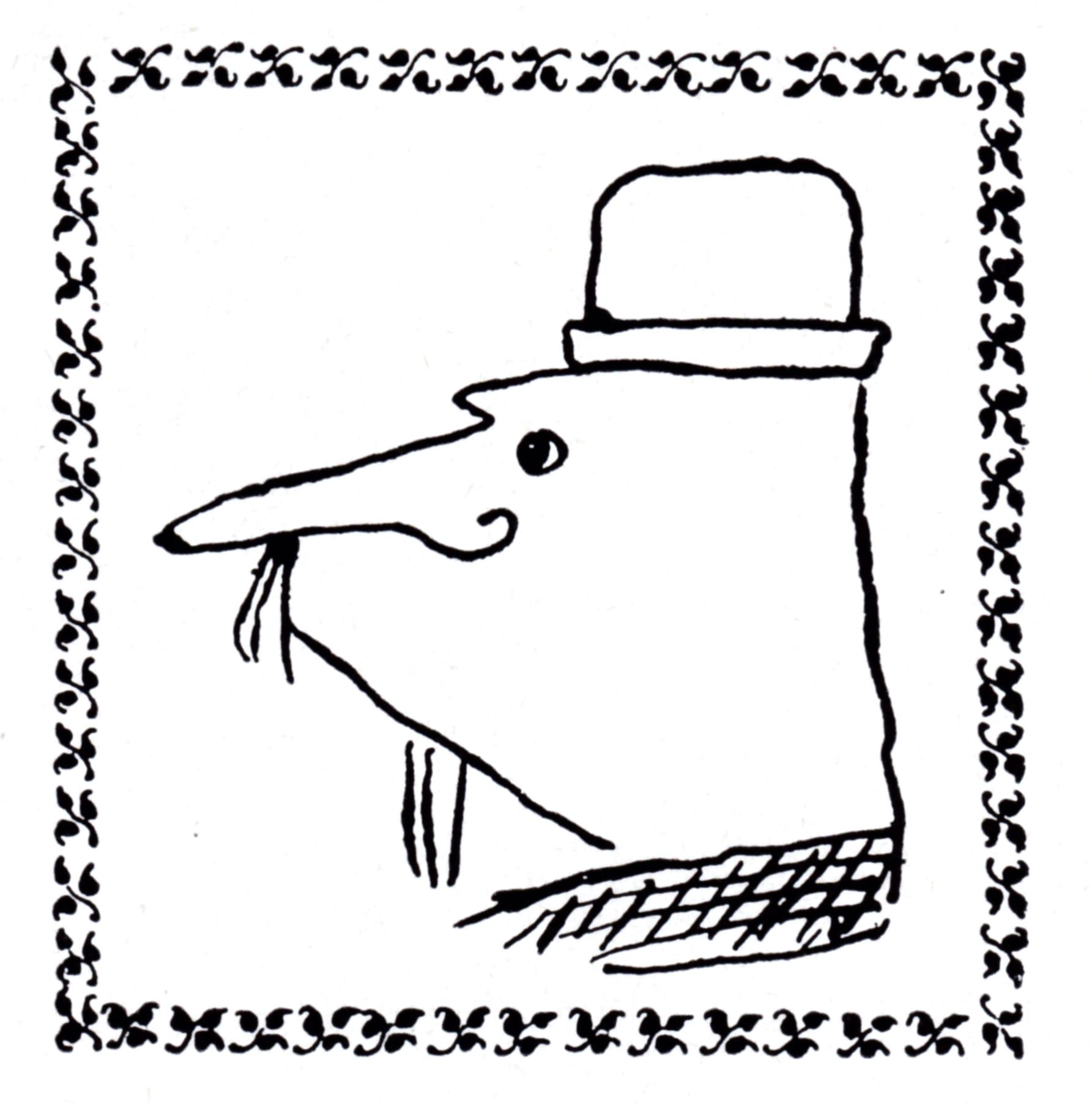 Dessin à la plume de 53 x 49 mm.